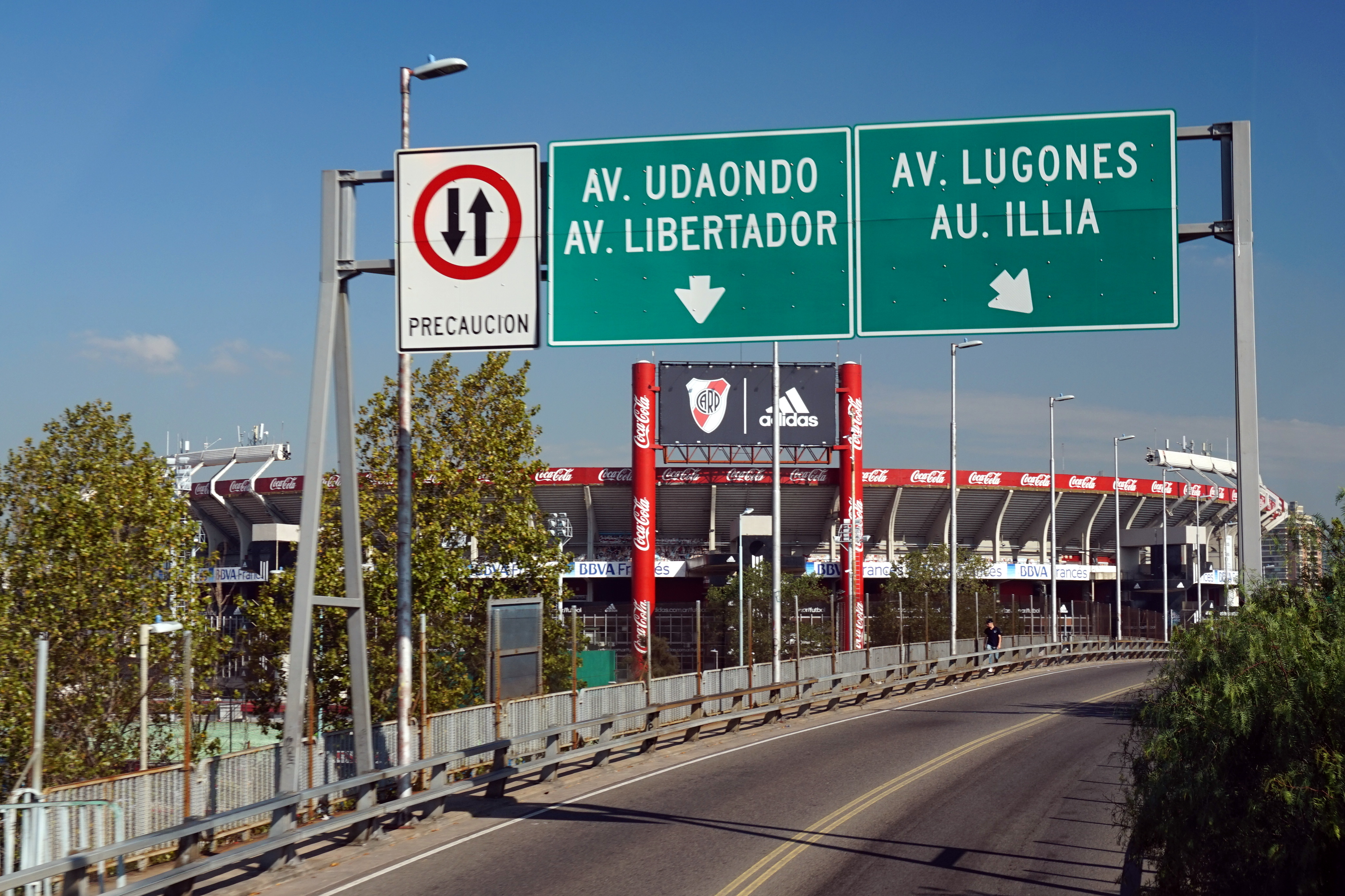 Estadio Antonio Vespucio Liberti, Buenos Aires, Argentina. Puente Ángel Labruna.